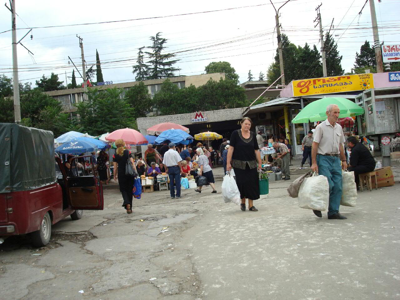 marche gare routiere de Didube